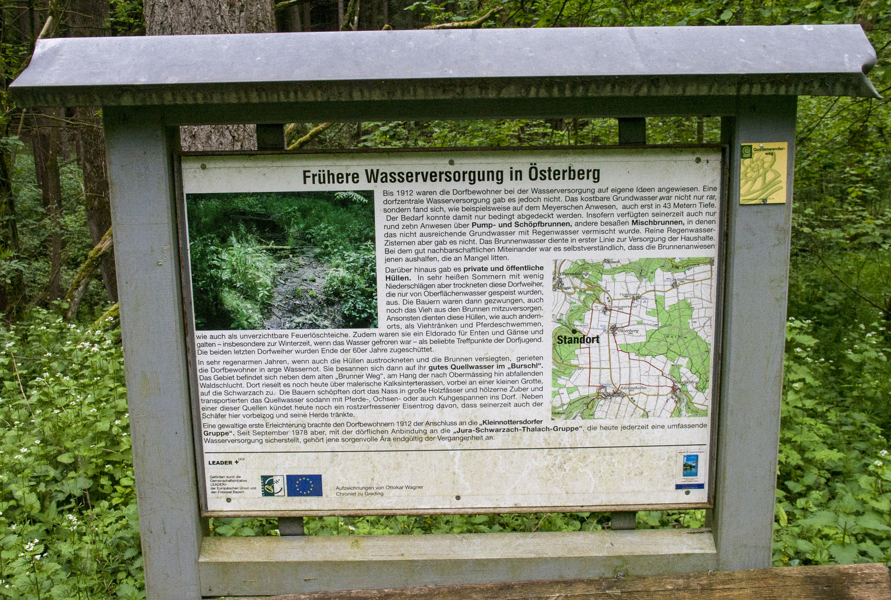 Naturschutzgebiet, Landkreis Roth, Greding, Sinterterrassen, Naturpark Altmühltal